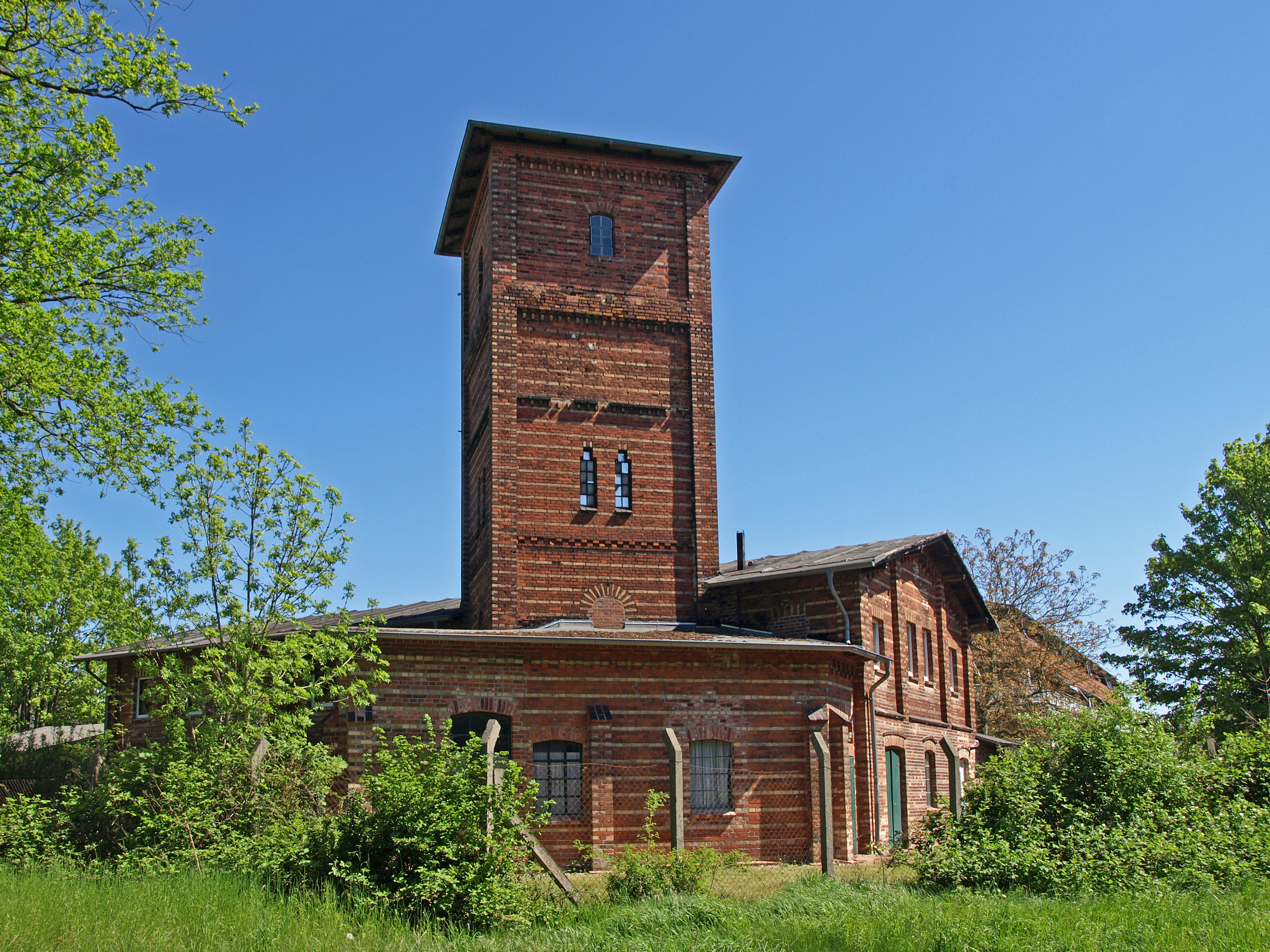 Maschinenhaus und Wasserturm der ehem. Wasserheilanstalt in Bad Kleinen